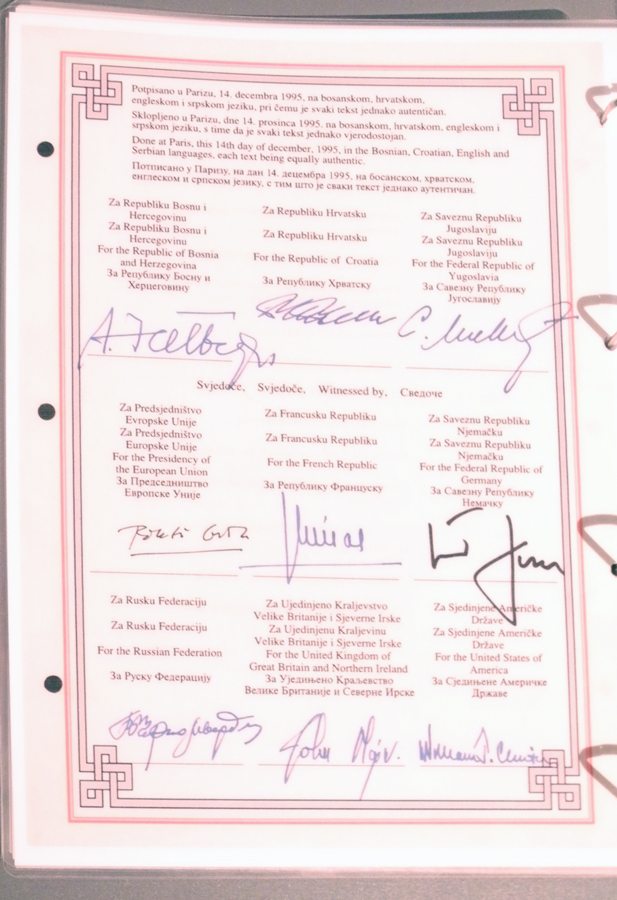 Izložba Domovinski rat u Hrvatskom povijesnom muzeju tijekom Noći muzeja.